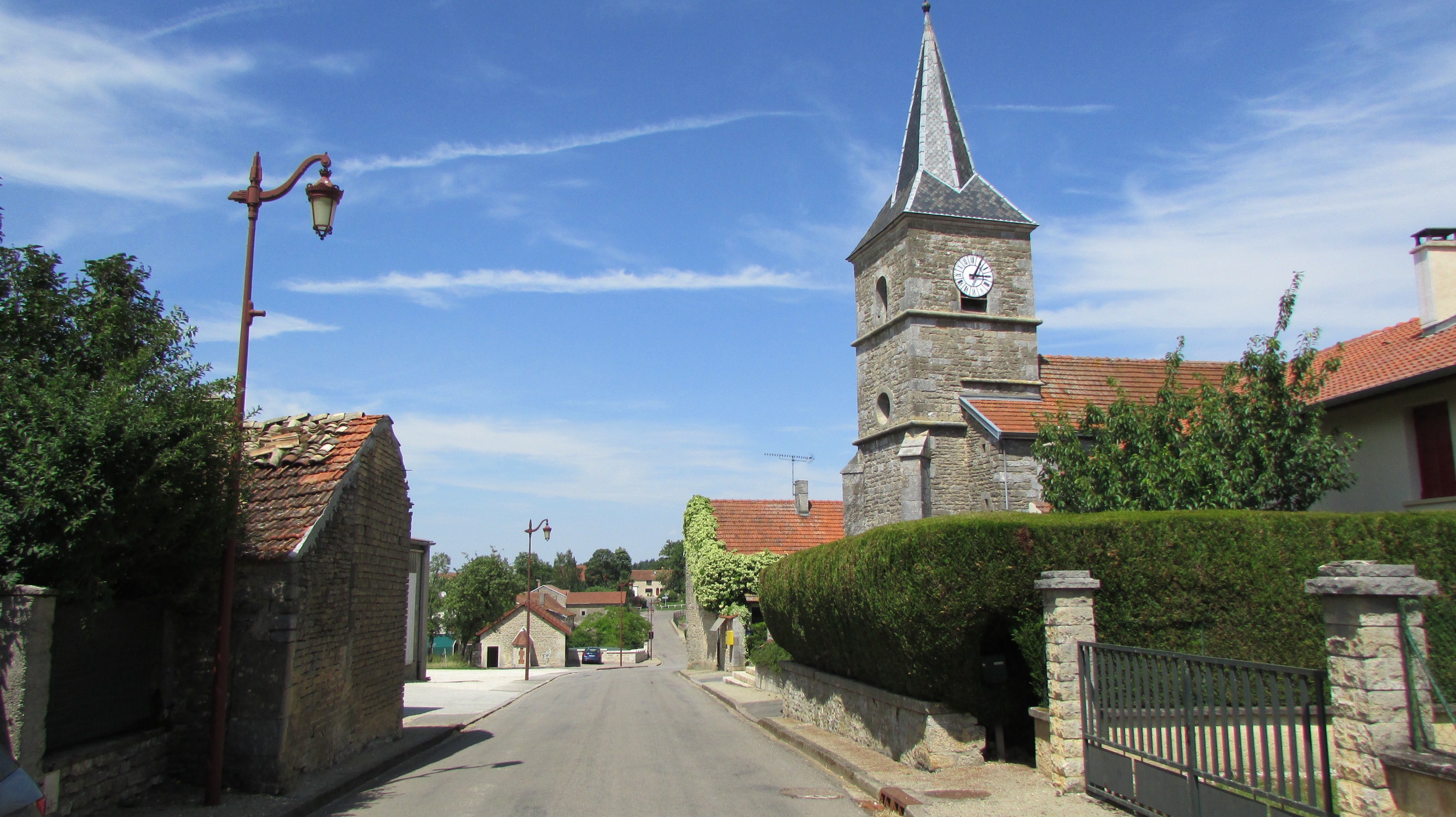 L'église